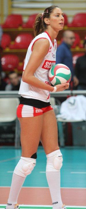 Dragana Marinković, pallavolista croata, gioca nel ruolo di centrale